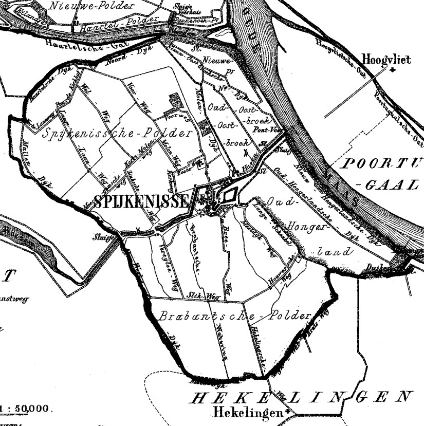 Kaart Spijkenisse en Braband 1867. Uitsnede van File:Spijkenisse 1867.png